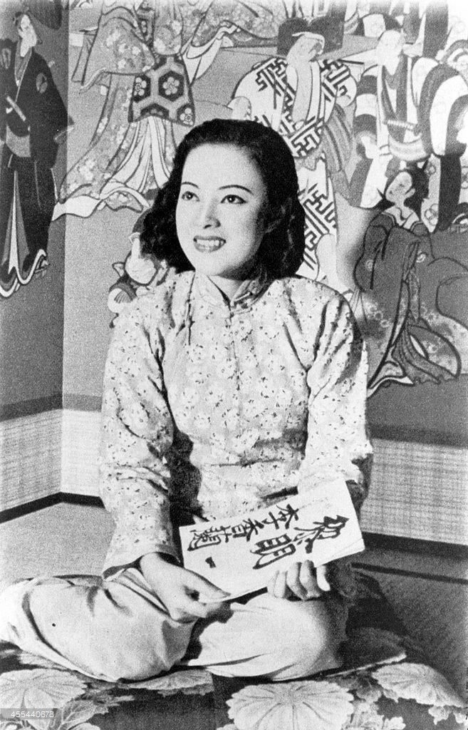 Actress Li Xianglan is seen at a dressing room of Kabukiza Theatre in August 1940 in Tokyo, Japan.